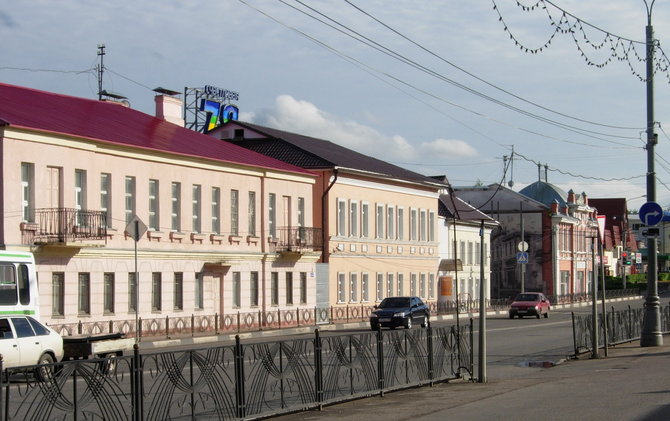 Streets in Klin